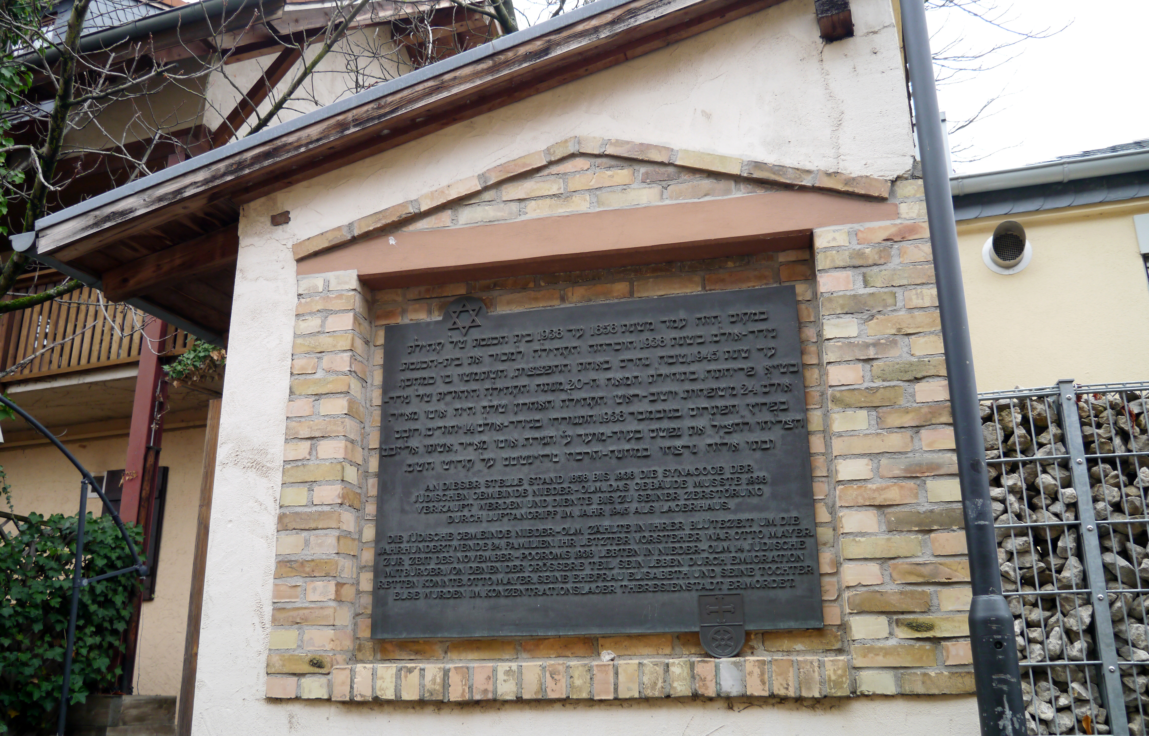 Gedenktafel an die ehemalige Nieder-Olmer Synagoge in der Mittelgasse (früher Synagogengasse). Die Inschrift: "An dieser Stelle stand 1858 bis 1938 die Synagoge der Jüdischen Gemeinde Nieder-Olm. Das Gebäude musste 1938 verkauft werden und diente bis zu seiner Zerstörung durch Luftangriff im Jahr 1945 als Lagerhaus. Die Jüdische Gemeinde Nieder-Olm zählte in ihrer Blütezeit um die Jahrhunderwende 24 Familien. Ihr letzter Vorsteher war Otto Mayer. Zu Zeit des November-Pogroms 1936 lebten in Nieder-Olm 14 jüdische Mitbürger von denen der grössere Teil sein Leben durch Emigration retten konnte. Otto Mayer, seine Ehefrau Elisabeth und seine Tochter Else wurden im Konzentrationslager Theresienstadt ermordet."